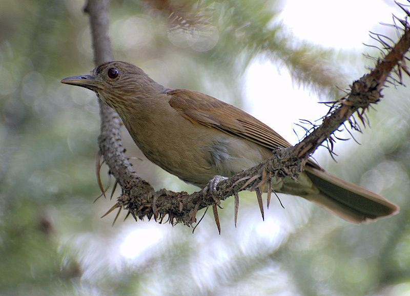 Turdus leucomelas , Parque da Independência, Museu do Ipiranga, São Paulo